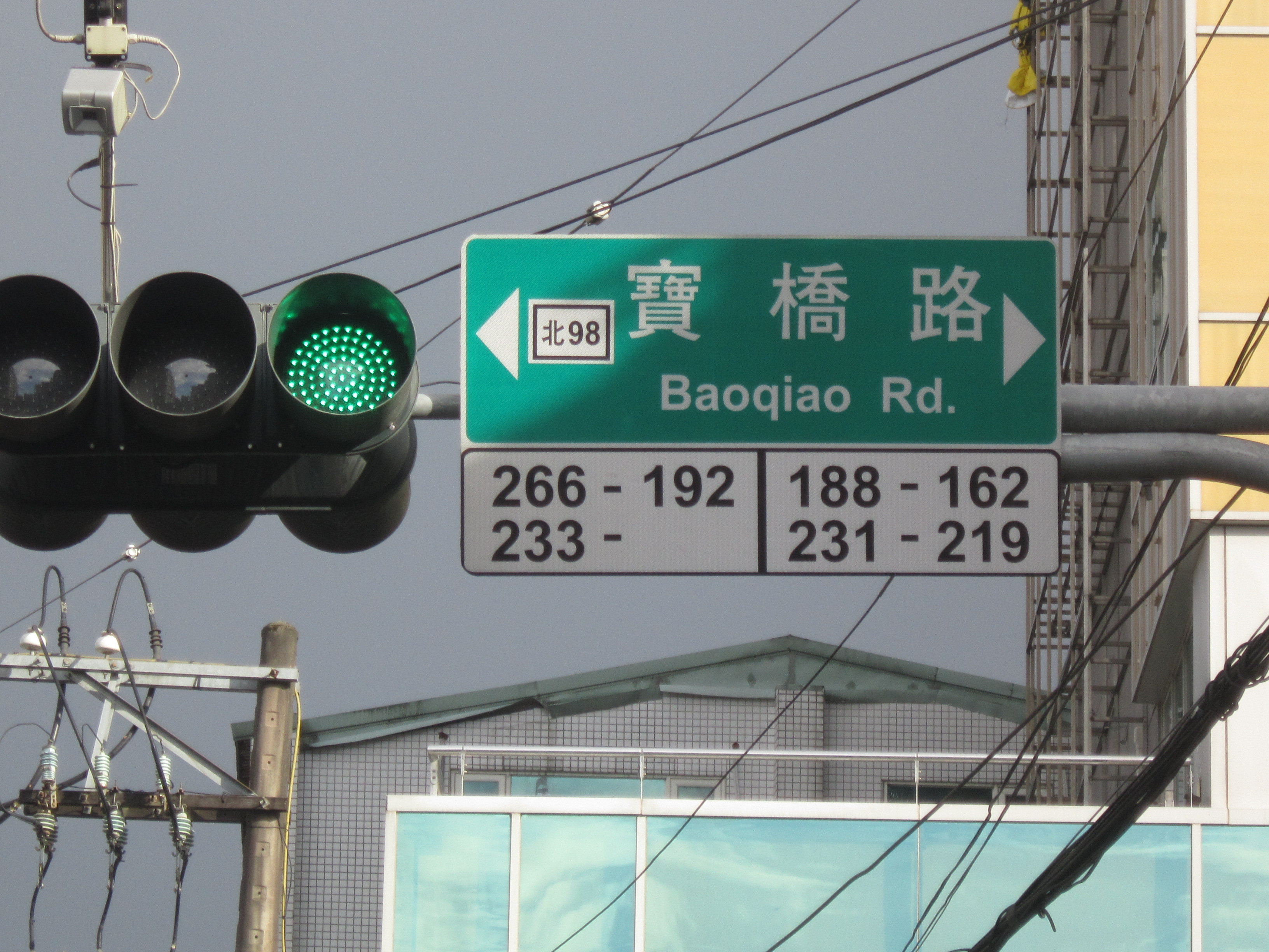 新北市新店區寶橋路的路標牌標明為北98線。